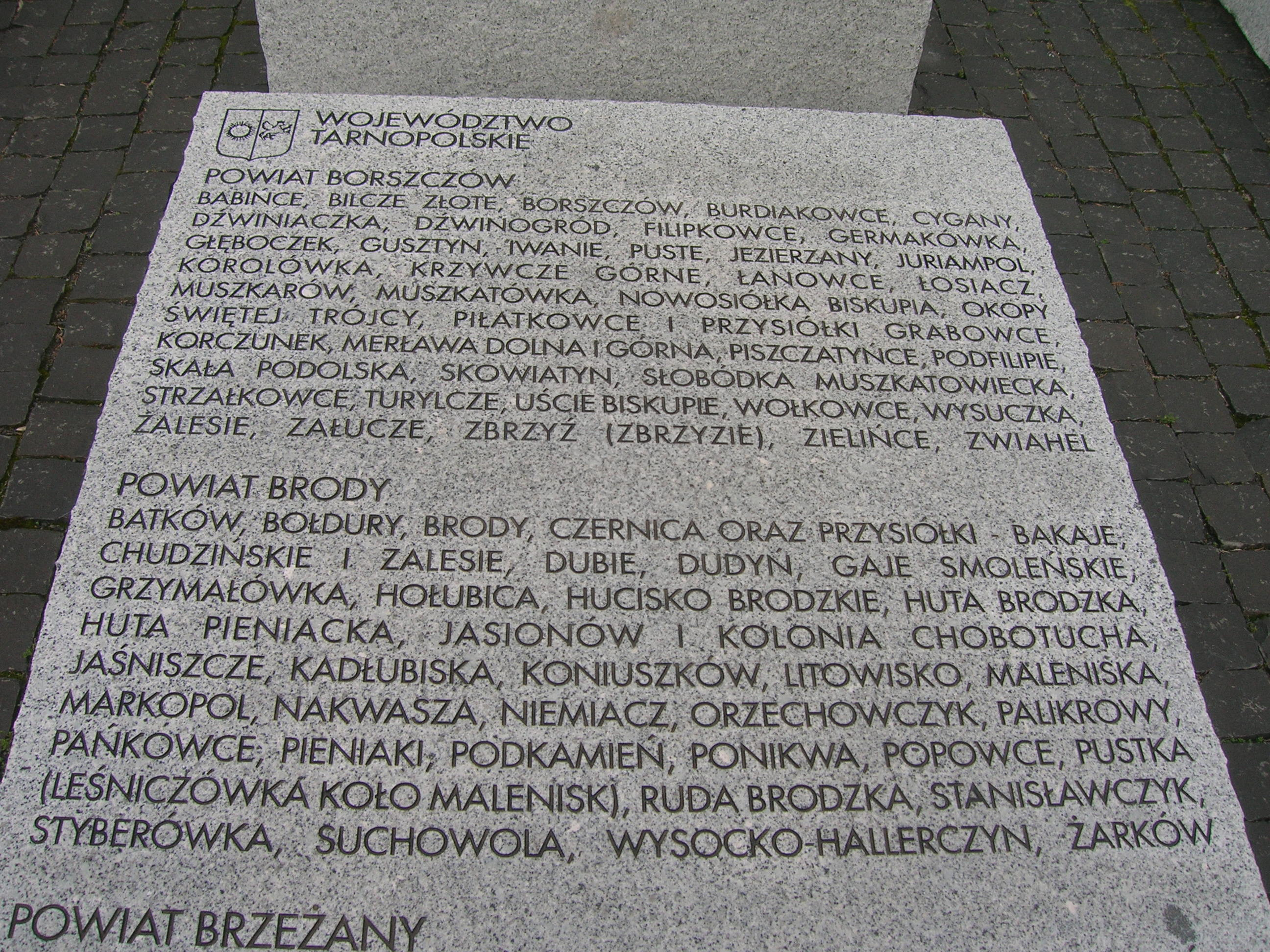 tablica powiaty Borszczów i Brody